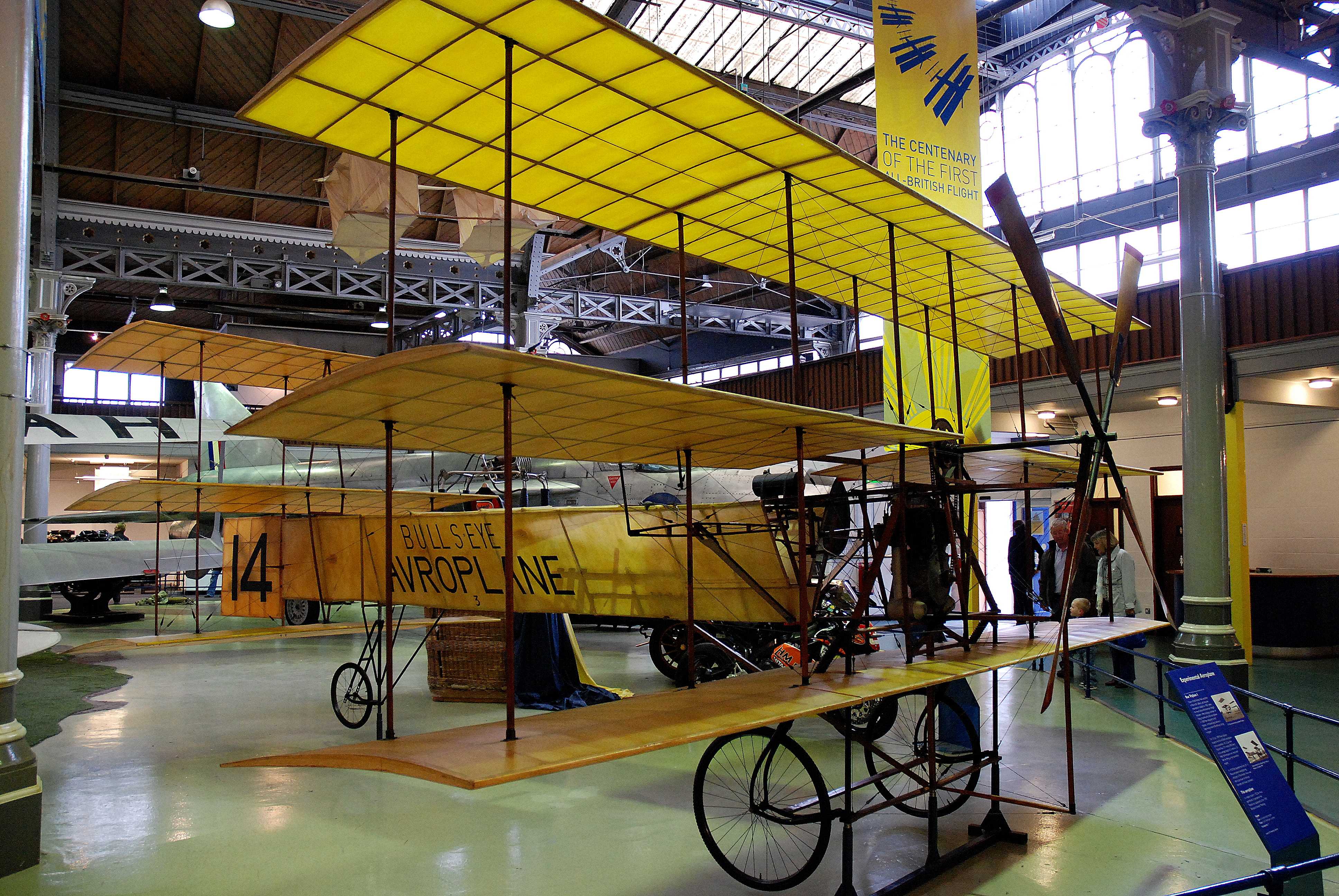 Replica uit 1952 van de Roe triplane I in het Museum of Science and Industry in Manchester, Engeland